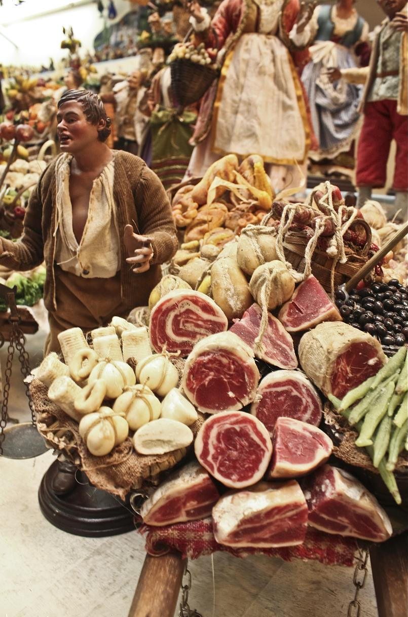 Arte presepiale - Via San Gregorio Armeno a Napoli - Italia. Presepial art in Naples - Italy.